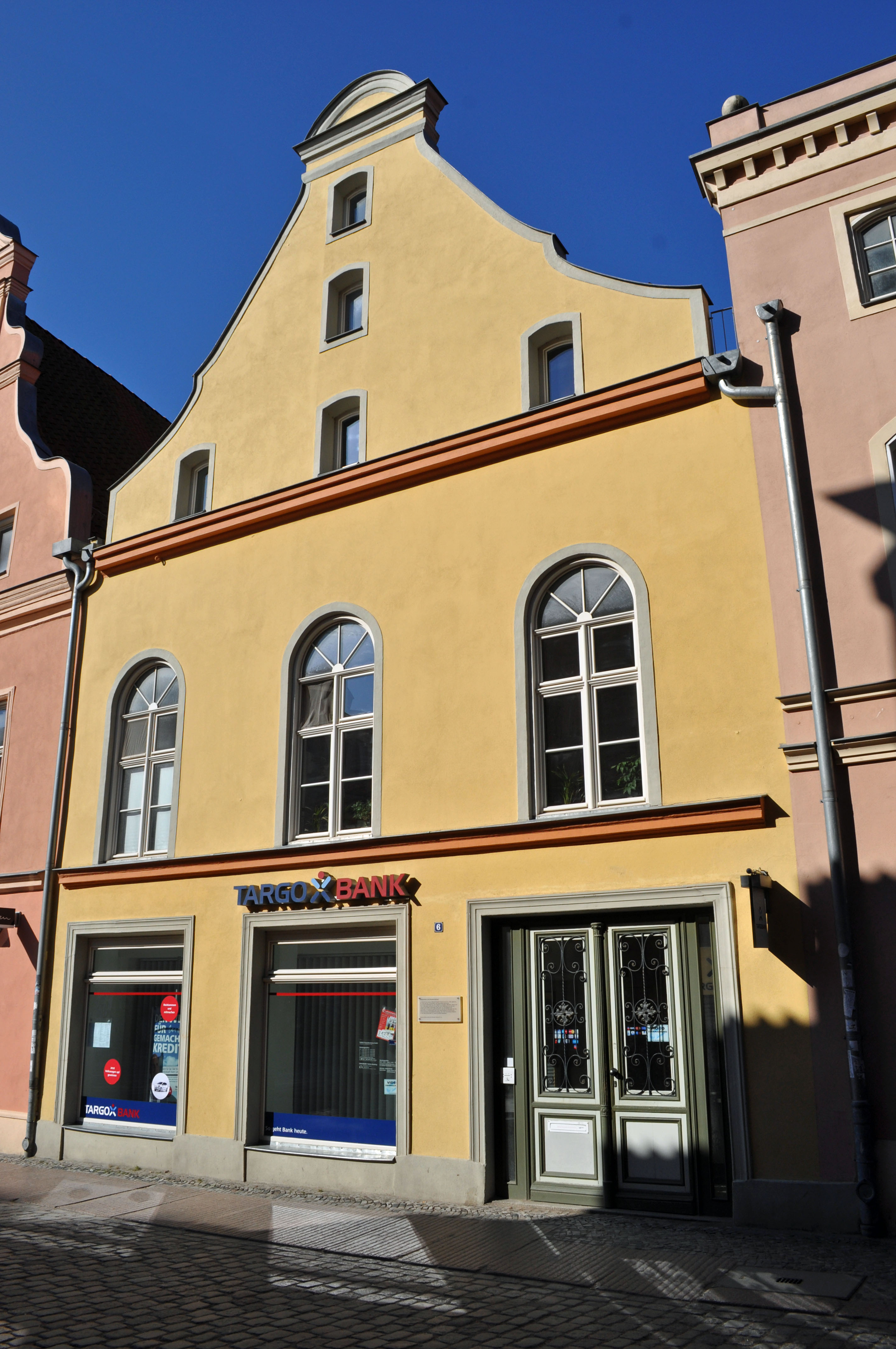 Gebäude bzw. Gebäudedetail in Stralsund. Straße und Hausnummer siehe Dateiname.